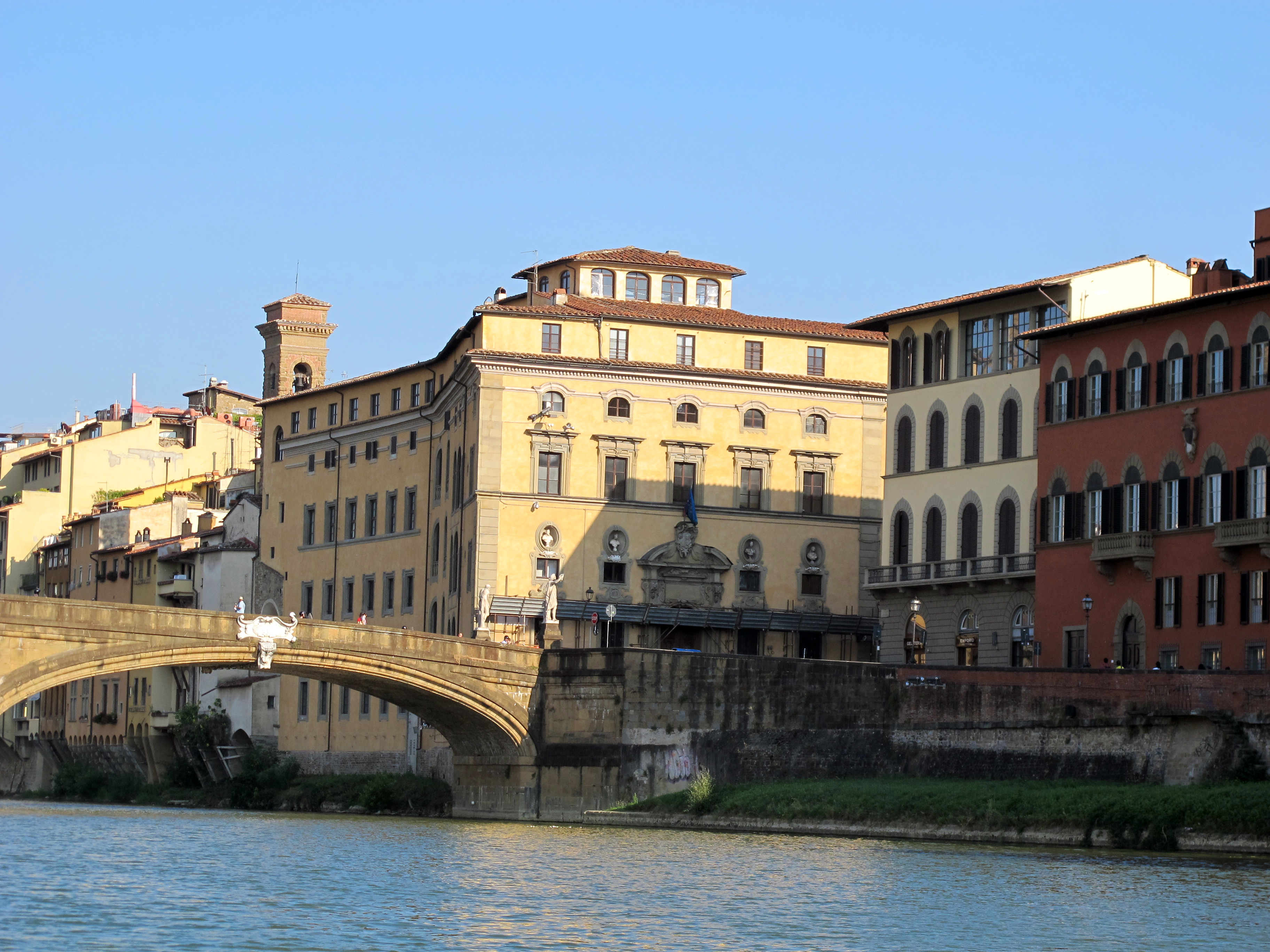 Palazzo della missione visto dal fiume